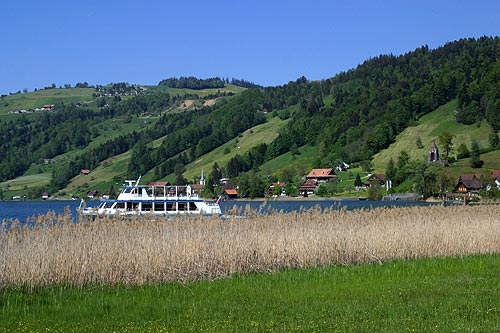 Ägerisee und Schlachtdenkmal vom Morgarten (Nr. 03.1-4555)